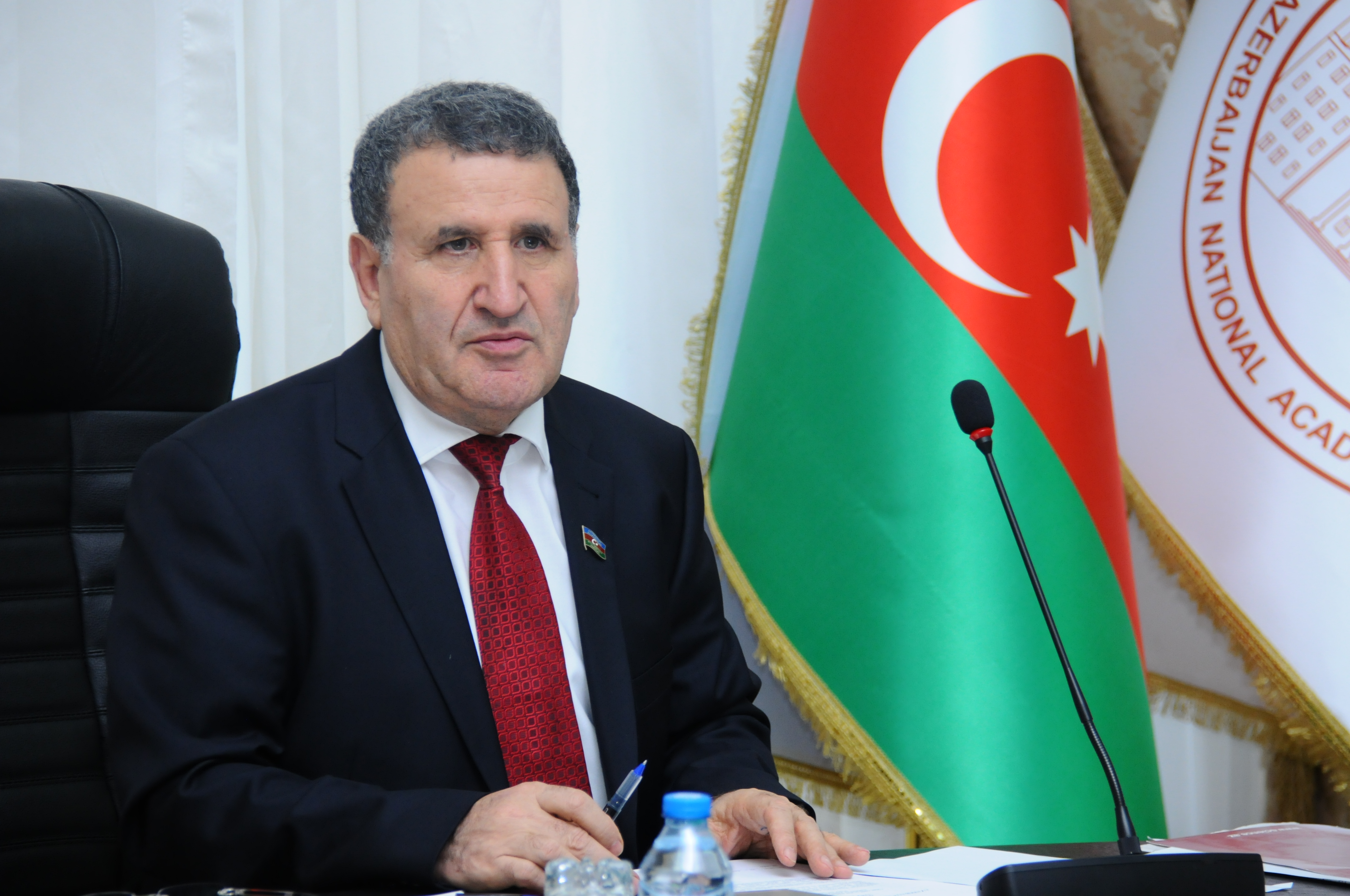 İsa Əkbər oğlu Həbibbəyli